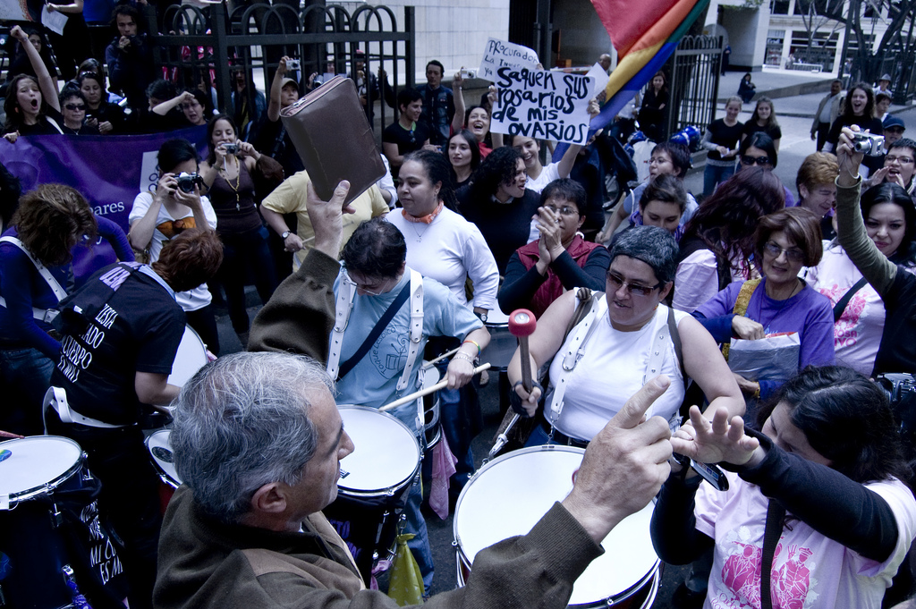 Sr. Predicando "valores" cristianos en protesta pro-aborto